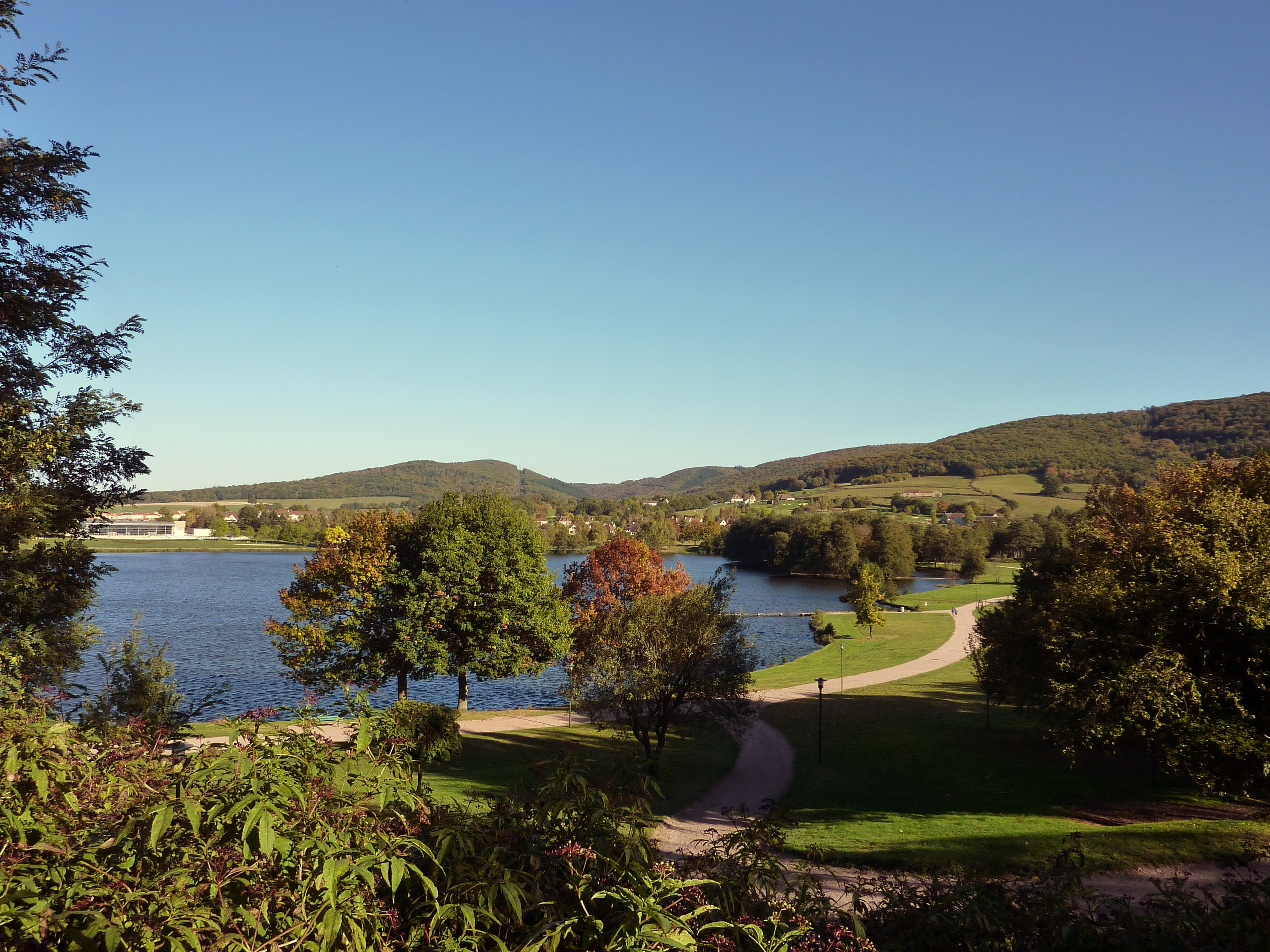 Le lac d'Autun (Saône-et-Loire, France)